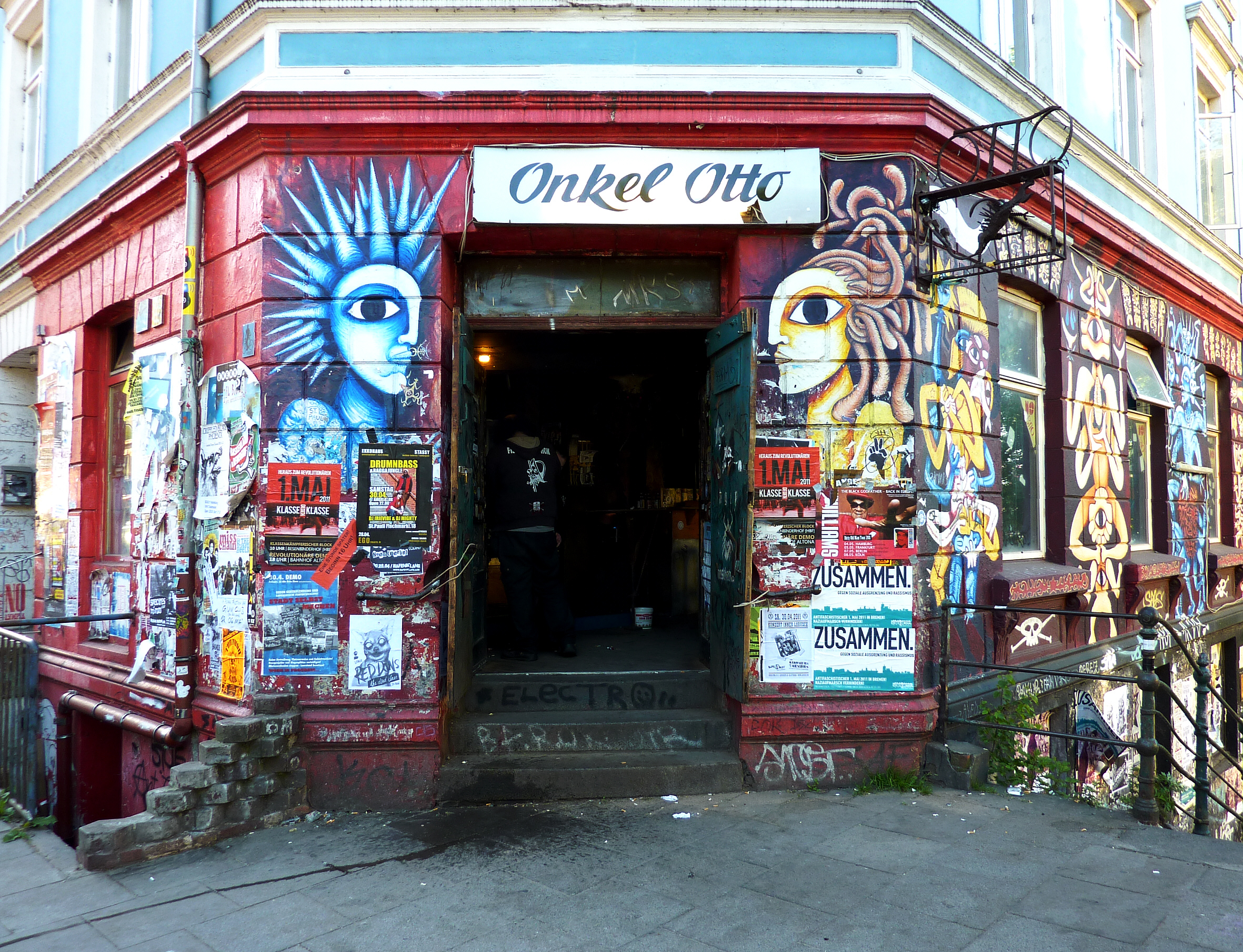 Onkel Otto ist eine Kneipe/Gaststätte/Pub in der Bernhard-Nocht-Straße von Hamburg-St. Pauli. Das Lokal wird ganz überwiegend von Menschen der Punk-Szene bevorzugt, Musikrichtung Punk-Rock und Reggae.